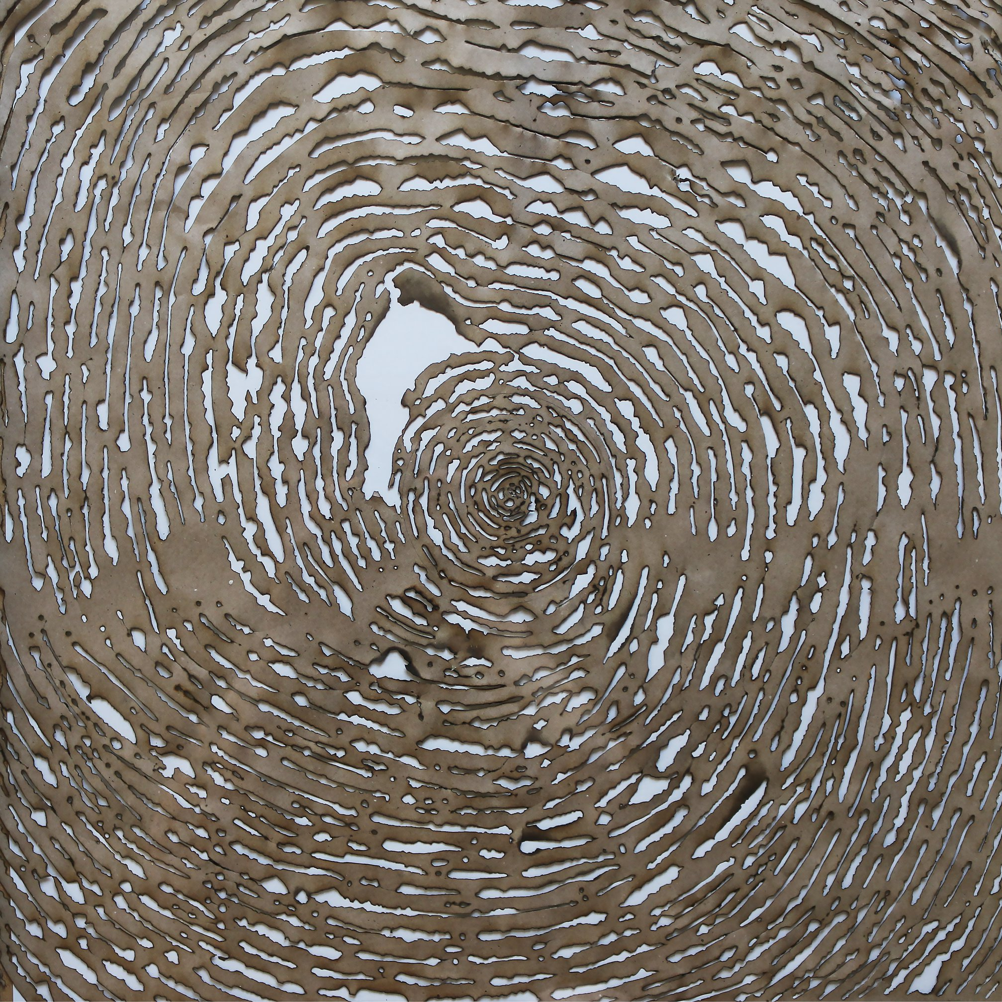 Praca Zuzanny Dolegi z cyklu "Pyro-paintings" wykonana techniką pirografii.